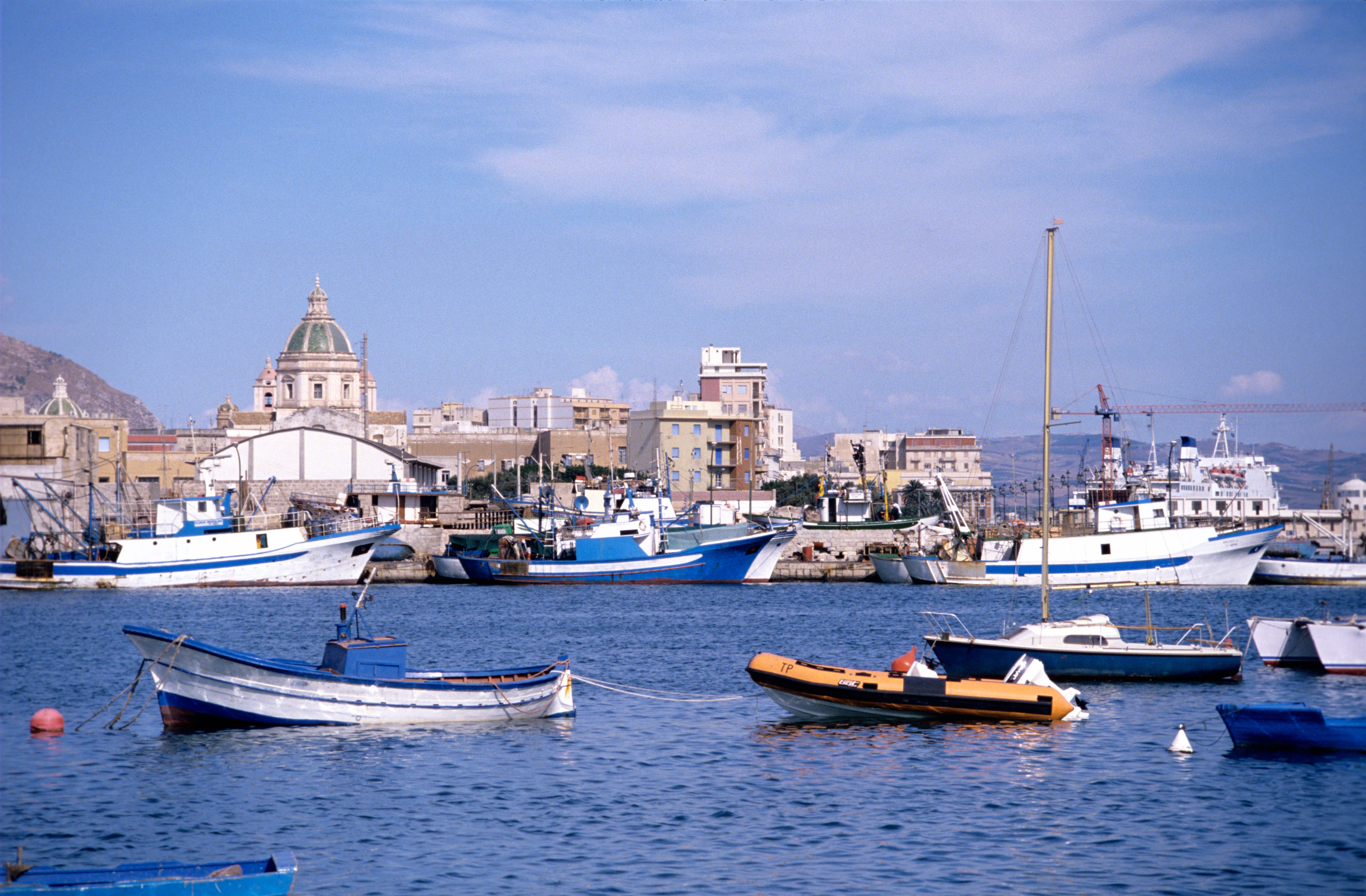 Des chalutiers et des senneurs dans le port de pêche (porto peschereccio) de Trapani. Trapani, Sicile, Italie.